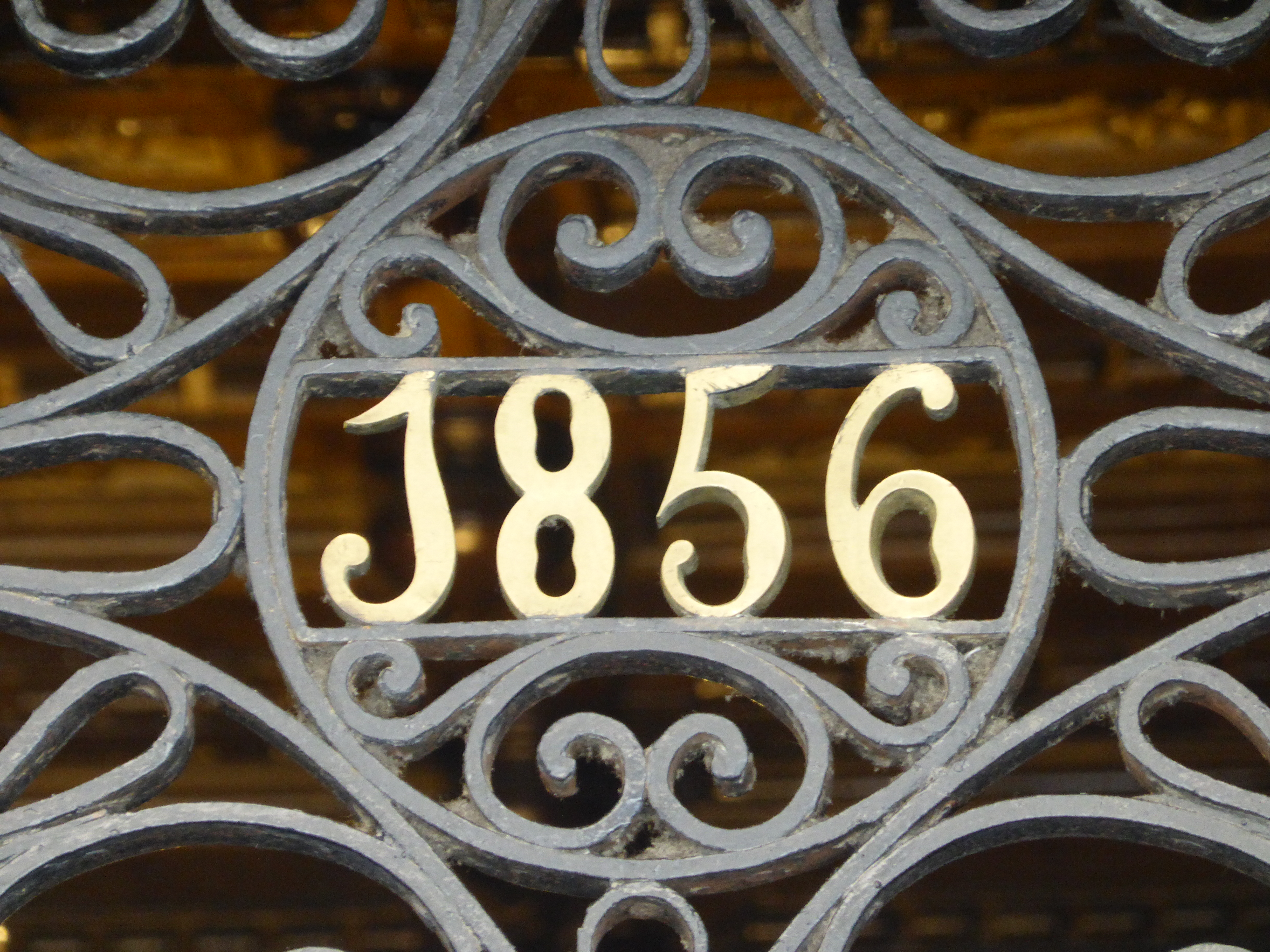 En el siglo XIX, en Madrid, era frecuente poner el año de construcción en las puertas exteriores de los edificios. En este caso, el año "1856" se encuentra en una casa muy céntrica, que corresponde al número 2 de la calle Espoz y Mina, esquina con la plaza conocida como Puerta del Sol. Este inmueble también es el número 2 de la Puerta del Sol (aunque se entra por Espoz y Mina, 2).